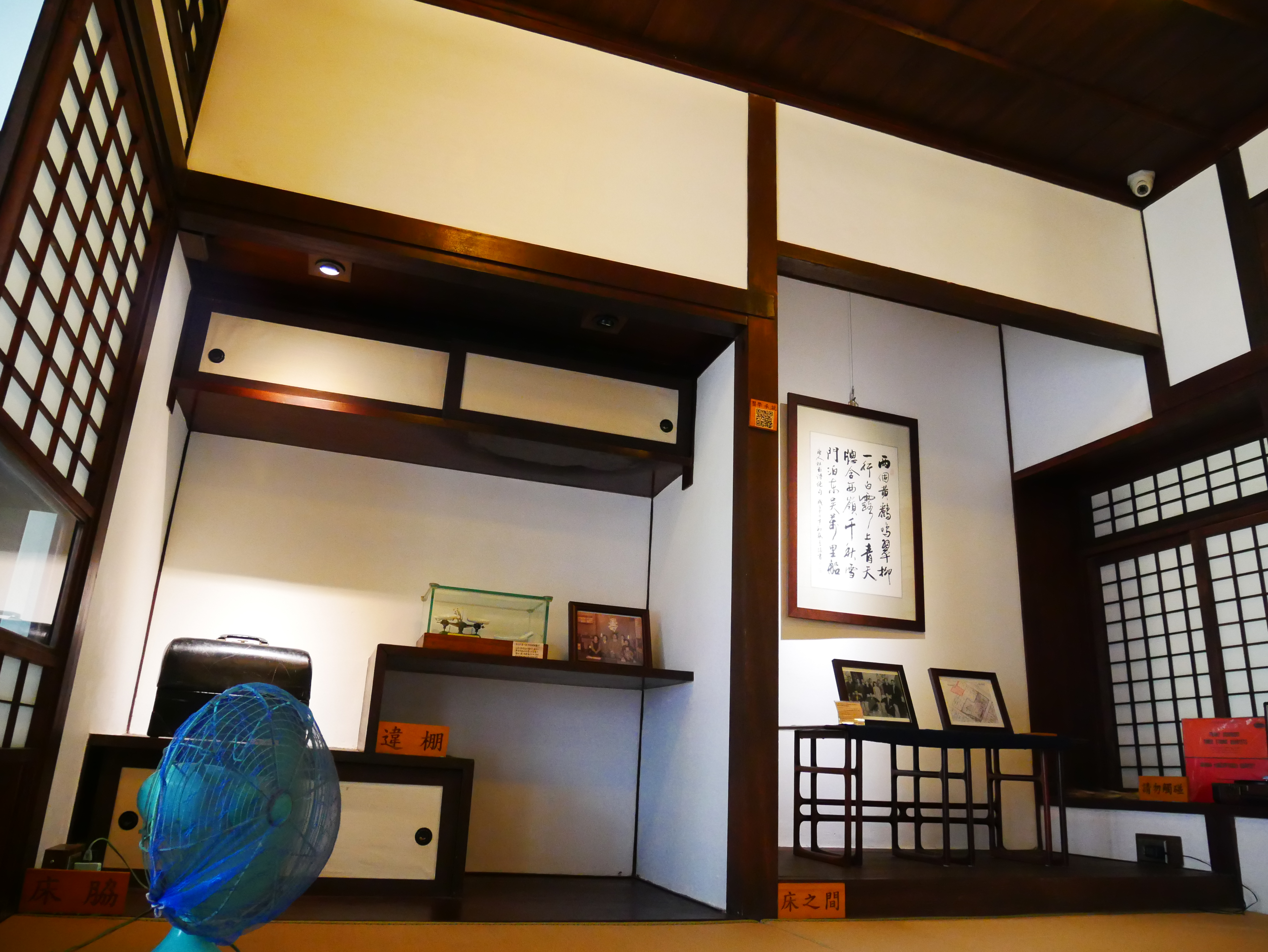 中文（台灣）: 李克承博士故居床之間（右）與床脇（左），新竹市北區西門聯里興南里